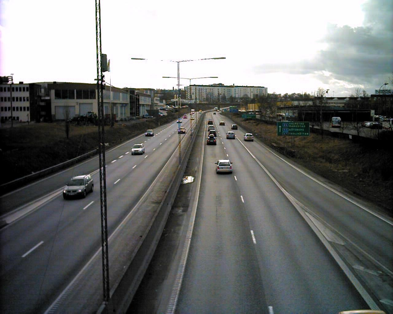 E4. Between Huskvarna and Jönköping. Photo taken by User:Boivie in Jönköping 7 April 2006